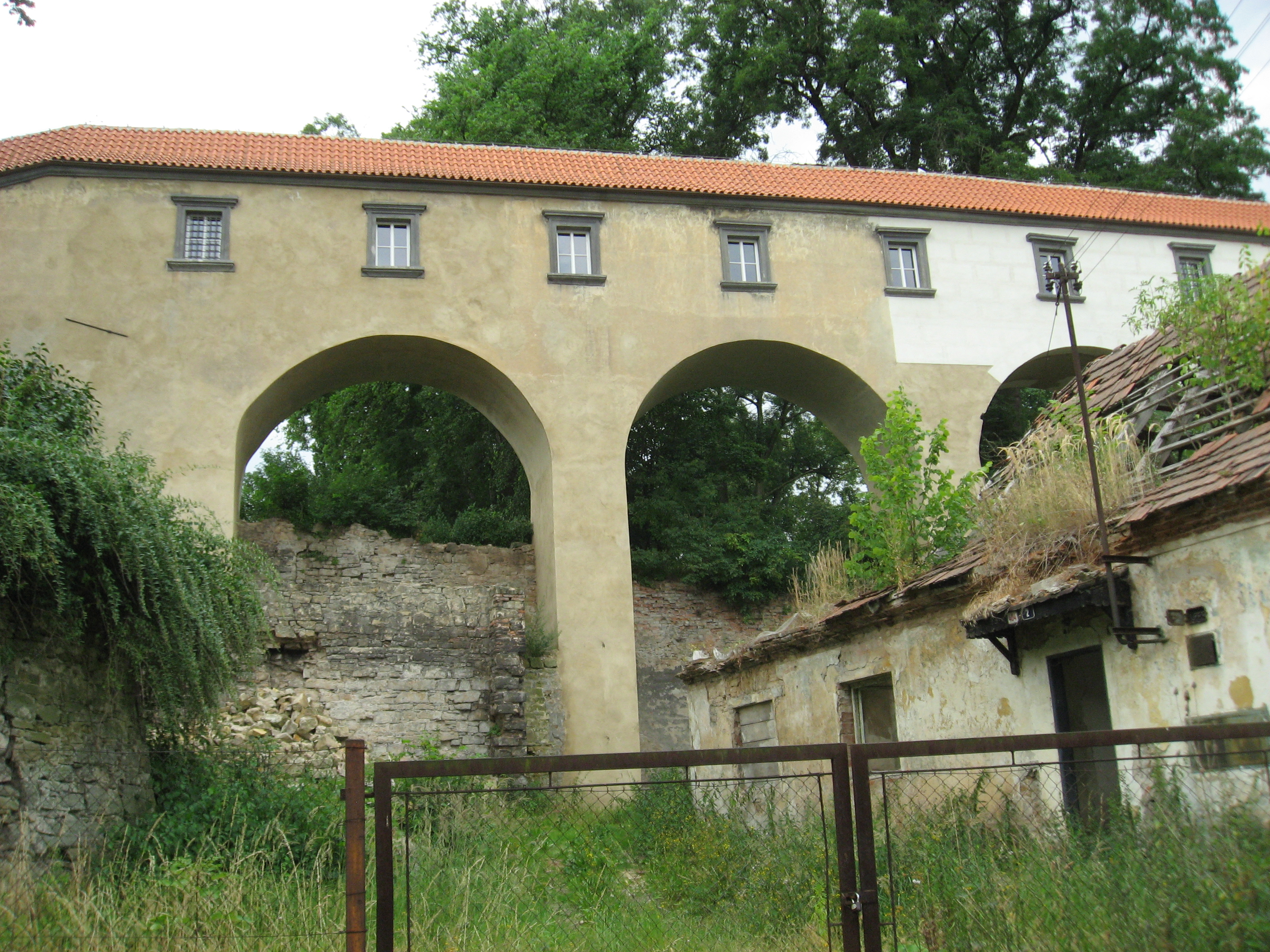 Brandýs nad Labem